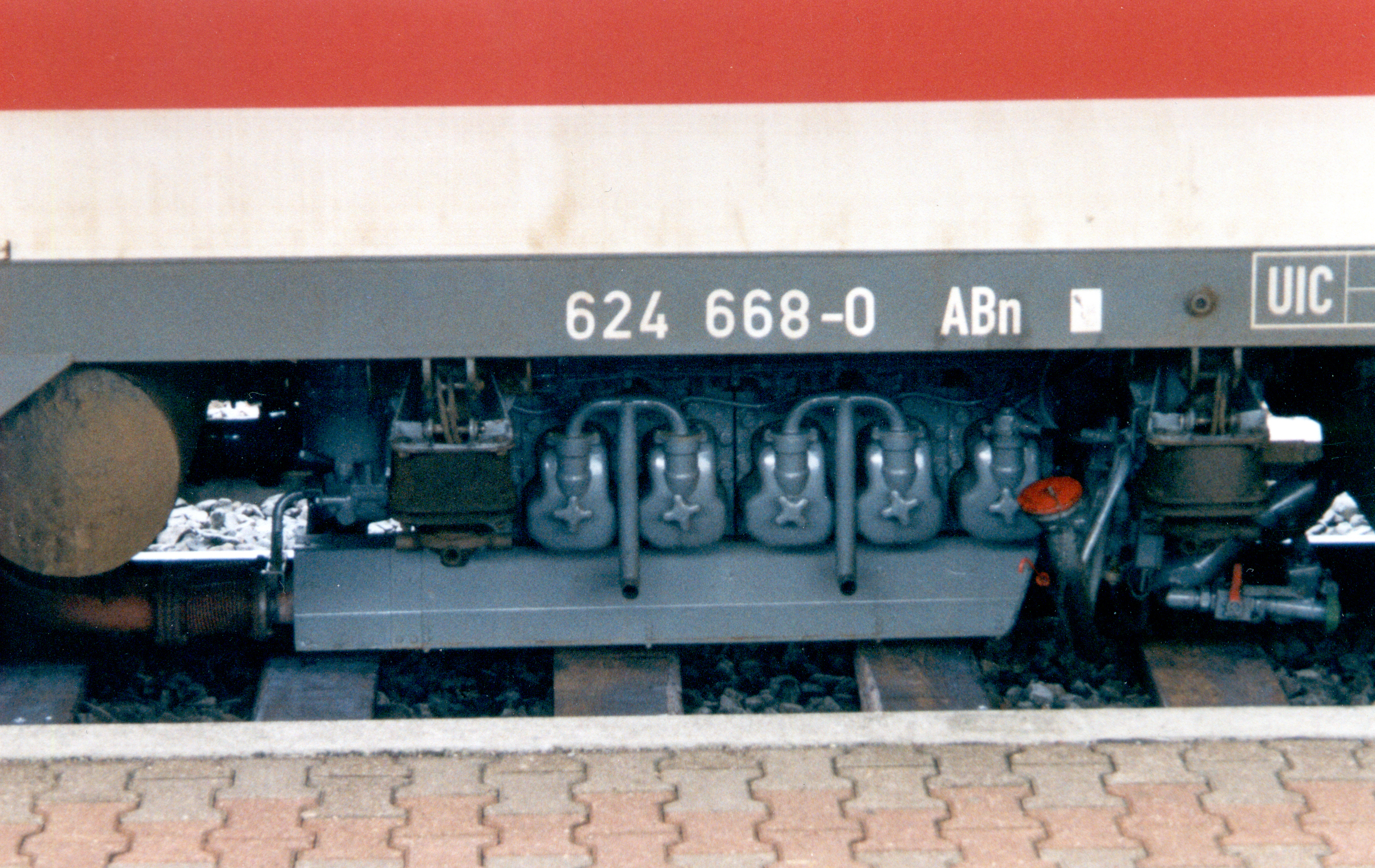 Antriebsmotor des 624 668-0, mit rechts angebrachten Einfüllstutzen für Motoröl und Kühlwasser.